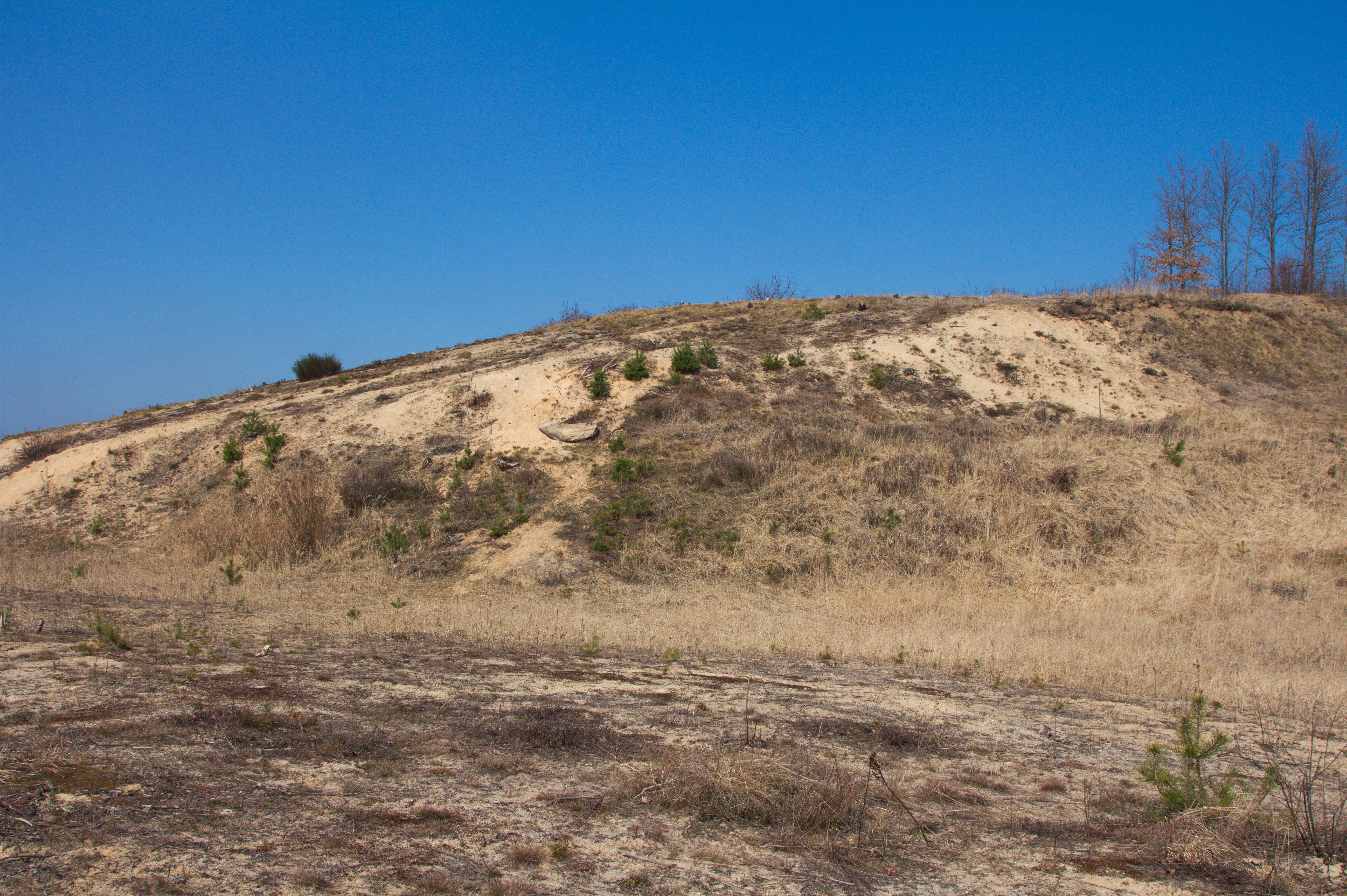 PP Pískovna u Dračice 08